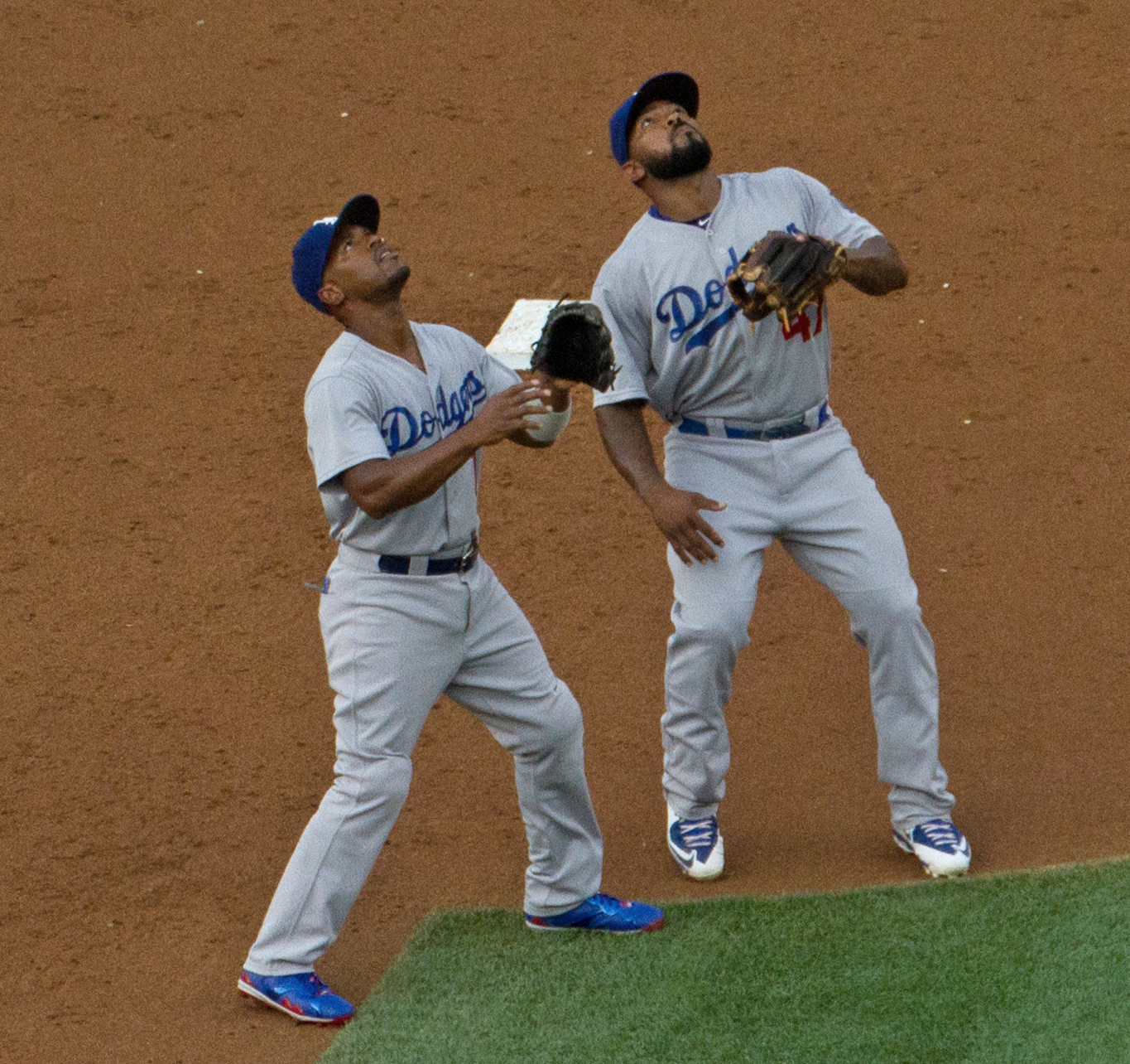 Jimmy Rollins (left) and Howie Kendrick